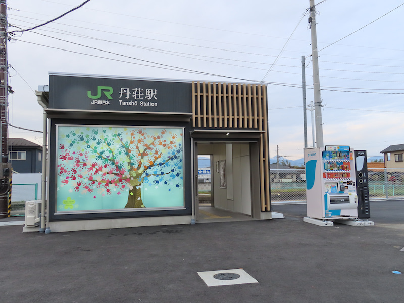 新たな町の玄関口に。